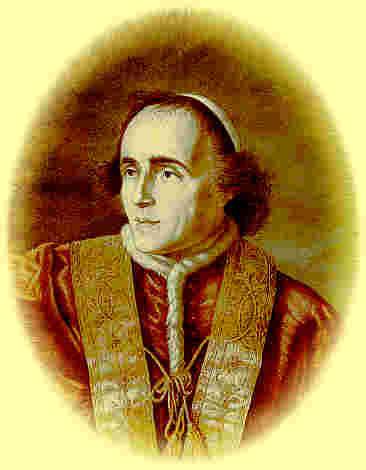 Peint à Rome d'après nature par Wicar